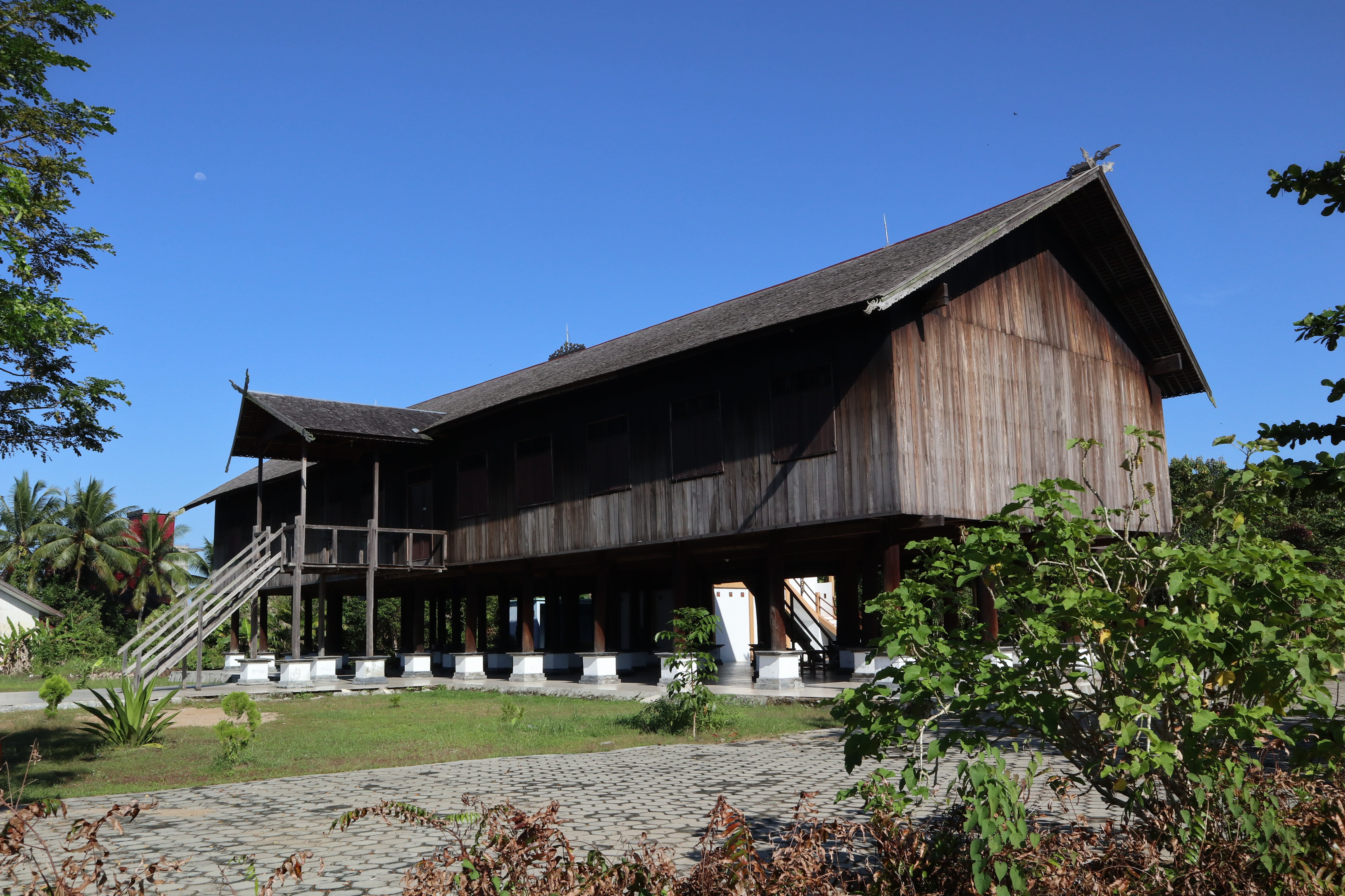 Rumah Betang Sei Pasah di kecamatan Kapuas Hilir, Kabupaten Kapuas, Kalimantan Tengah.